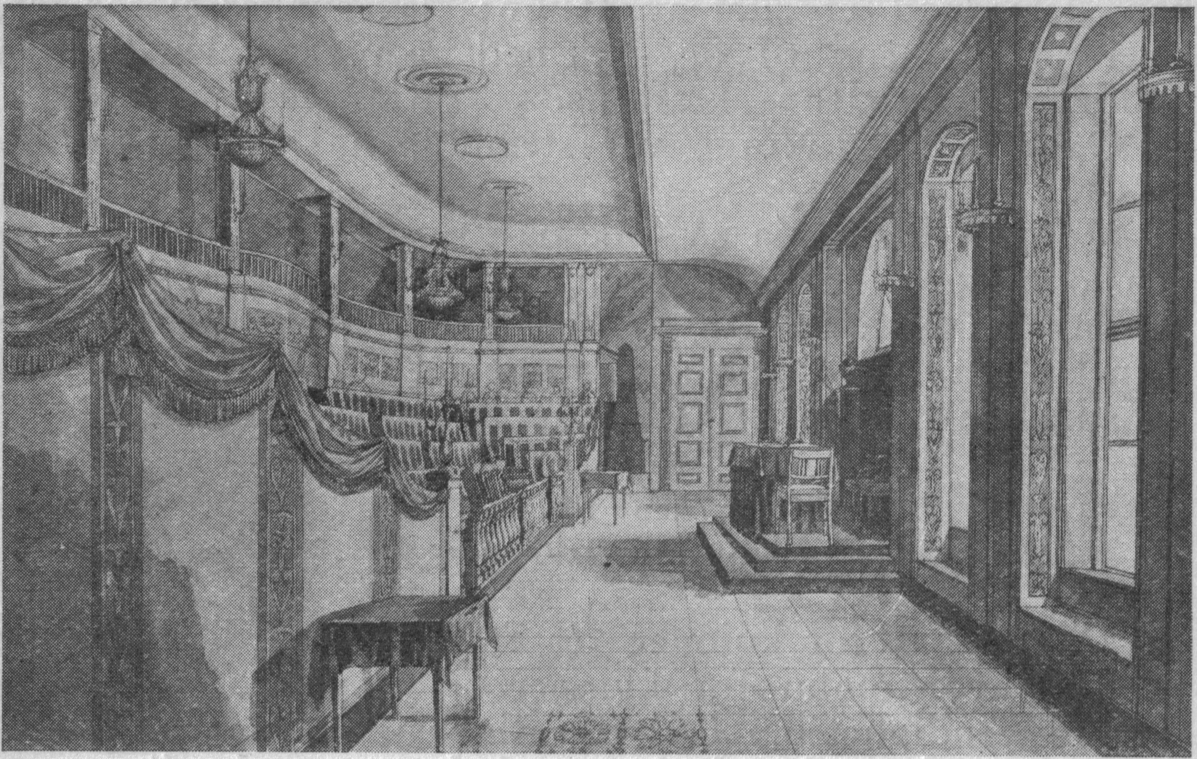 Den gamle stortingssalen.